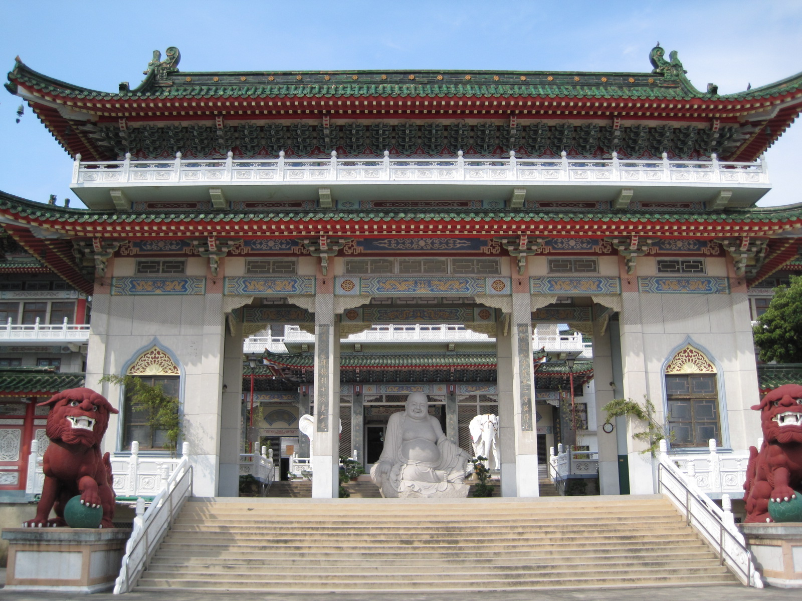 臺南竹溪寺山門